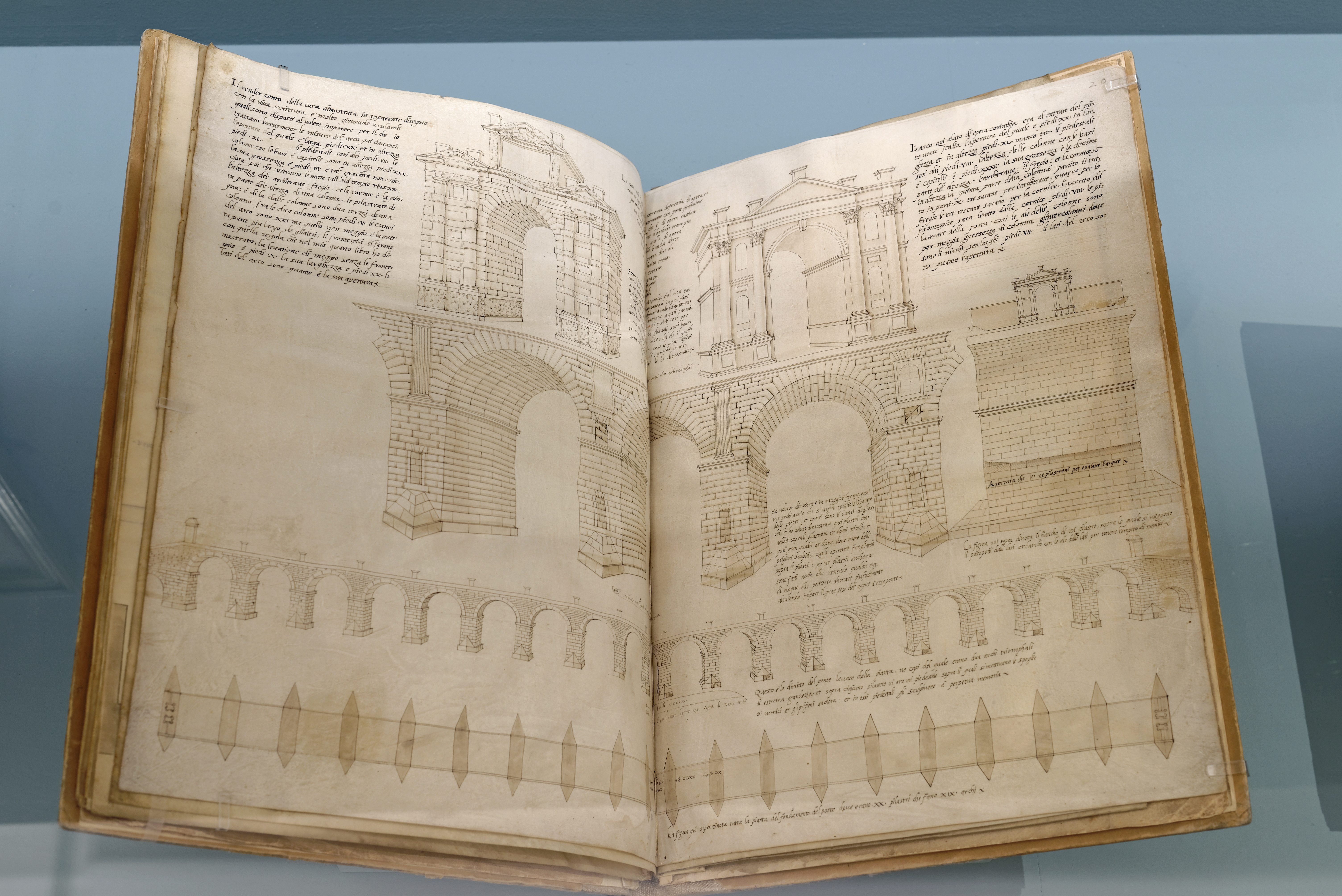 Sebastiano Serlio (1475-1554), Ottavo libro d’architettura. Della castrametatione di Polybio 1551-1554 Manuscrit sur vélin Munich, Bayerische Staatsbibliothek München Ouvert aux folios 19 vo– 20 ro : Arcs et fondations d’un pont